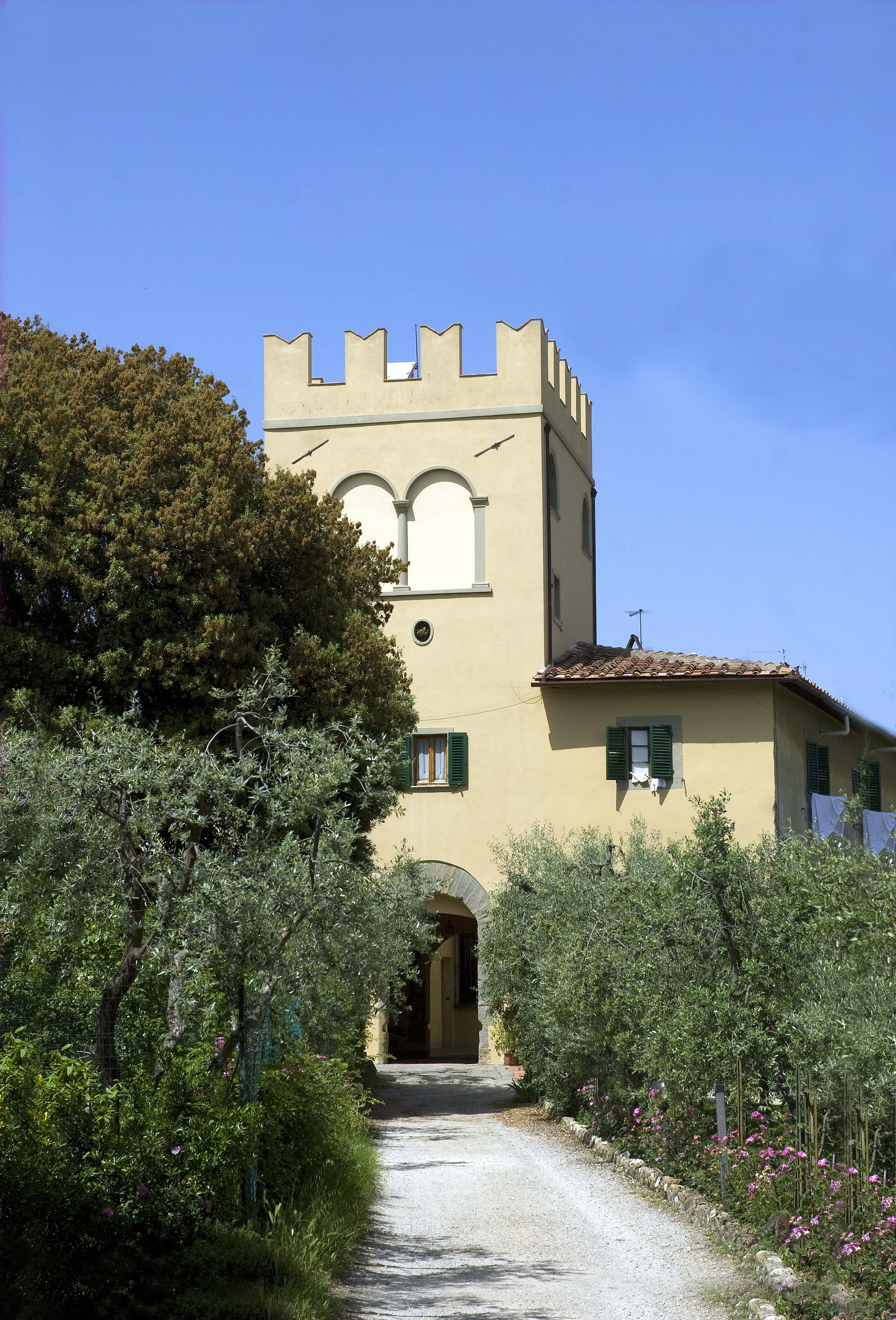 Palazzo del Cassero (San Casciano in Val di Pesa)